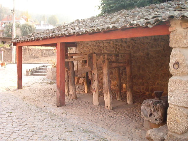 Antigo ferreiro, freguesia de Melo, concelho de Gouveia, distrito da Guarda, Portugal.